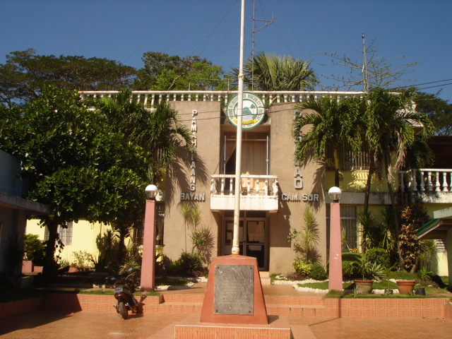 Pasacao, Camarines Sur, Philippines